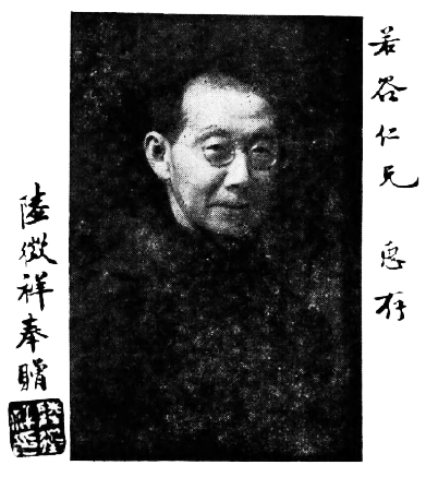 陸徵祥國務總理